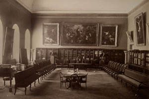 Escuela Nacional de Bellas Artes, 1867. Antigua Academia de San Carlos.